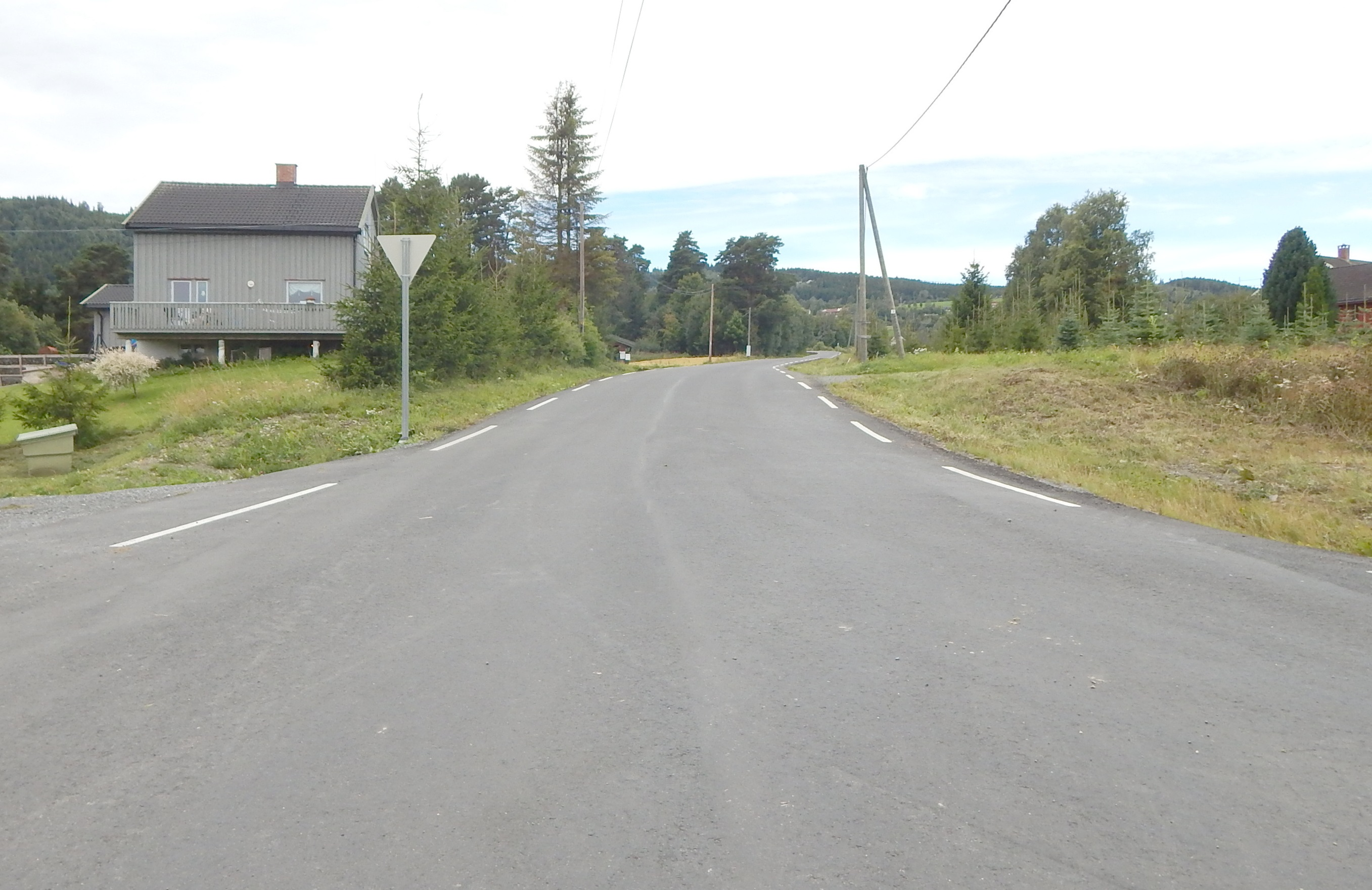 Åsrovegen (tidligere fylkesvei 170, nå kommunal vei 5426) sett fra Biristrandvegen